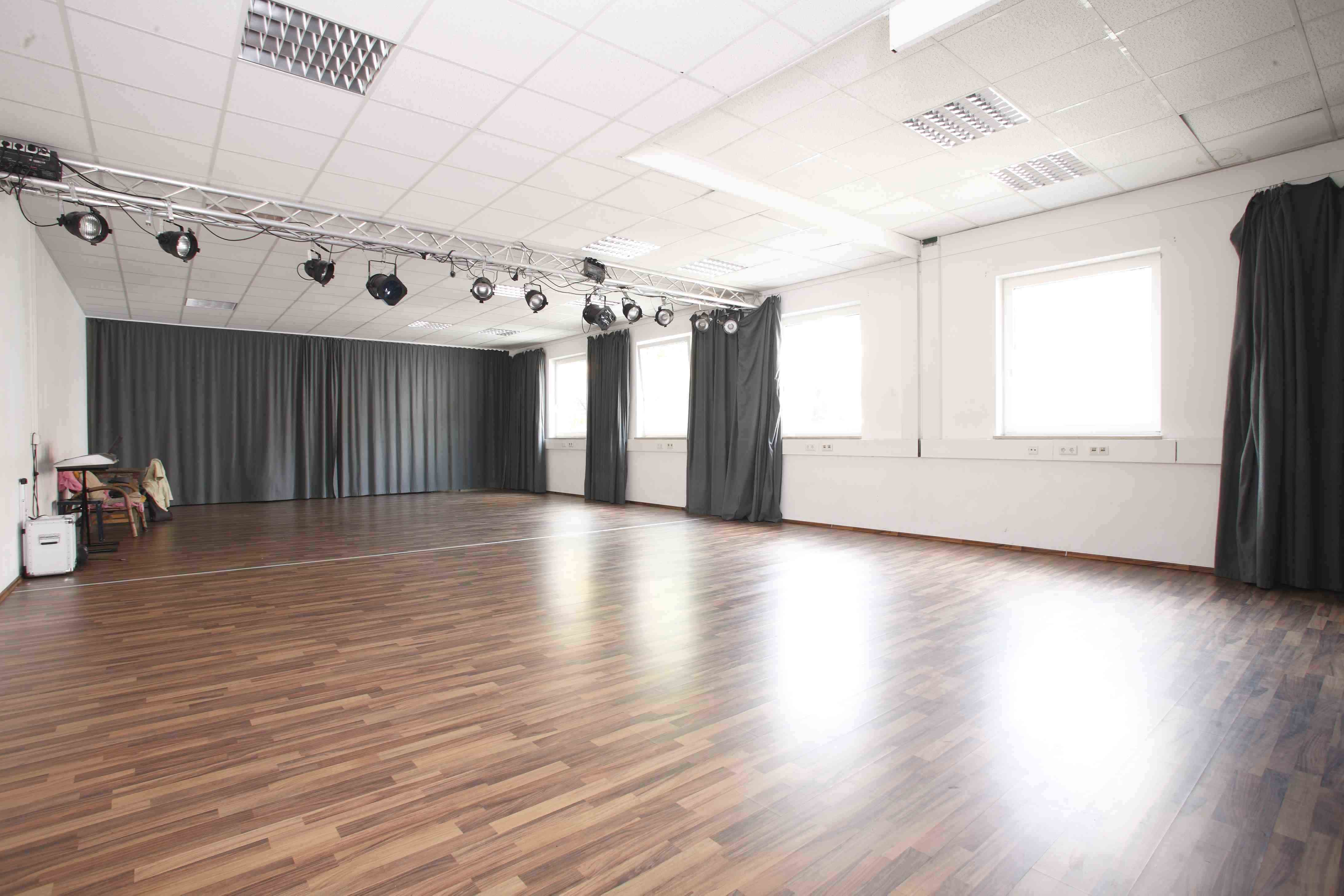 Großer Raum der Neuen Münchner Schauspielschule